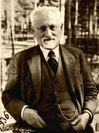 Российский учёный и общественный деятель Семён Маркович Дубнов (1860-1941)